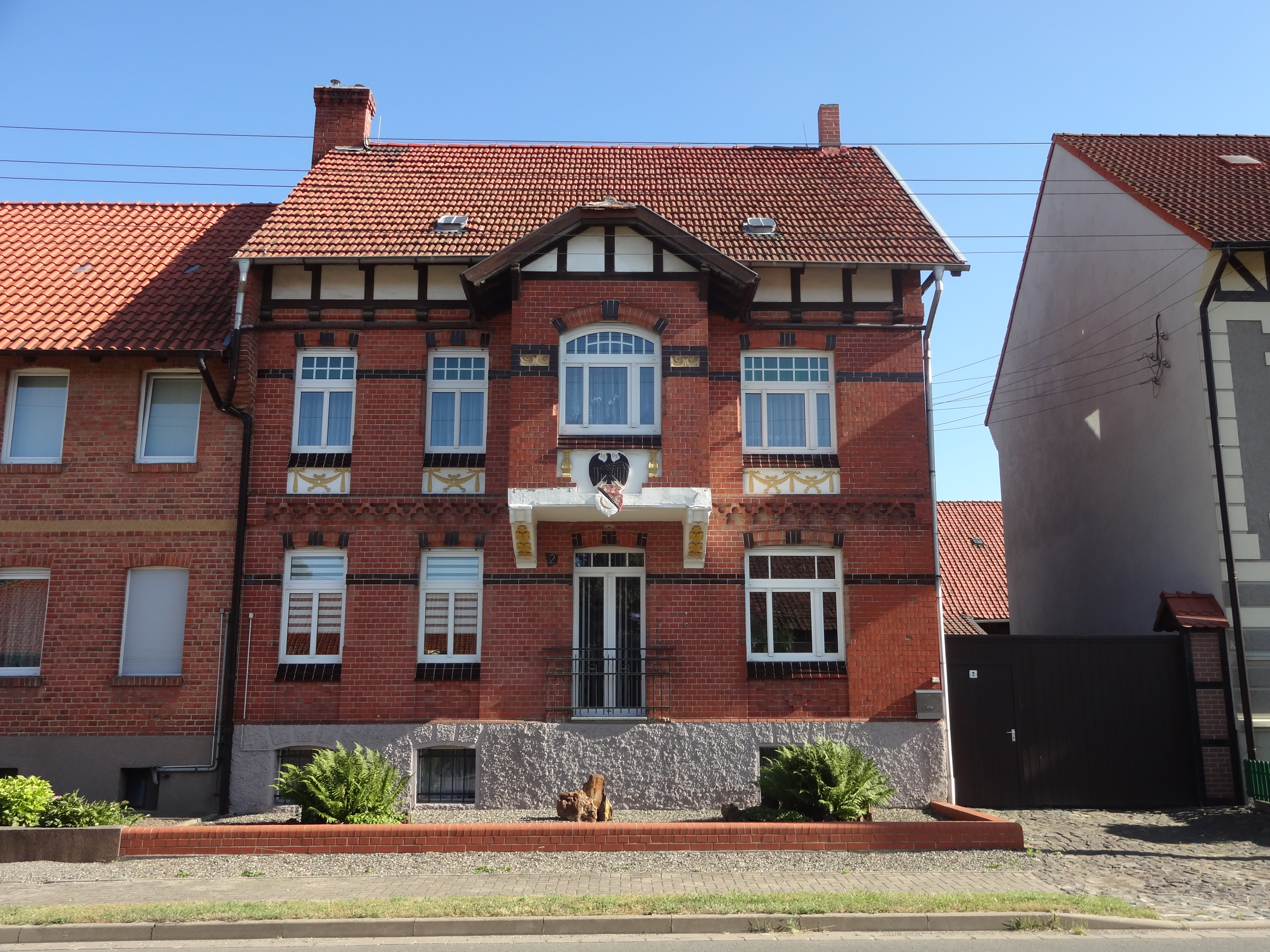 denkmalgeschütztes Postamt in Otto-Bethmann-Straße 2 in Harsleben)